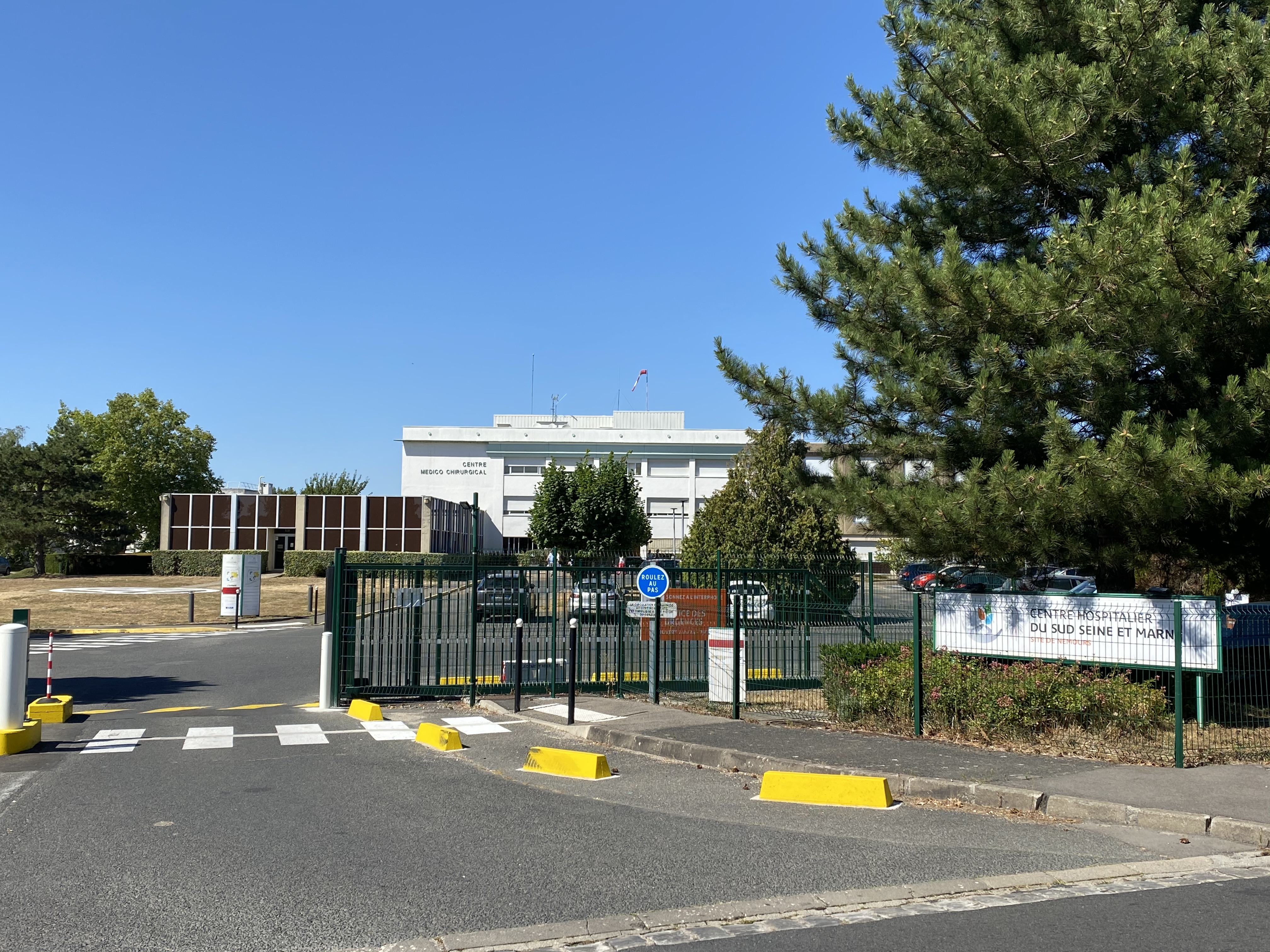 Entrée principale du site de Nemours du Centre hospitalier Sud Seine et Marne